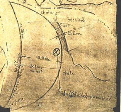 Půdorys měsíční šachty se vstupní puklinou